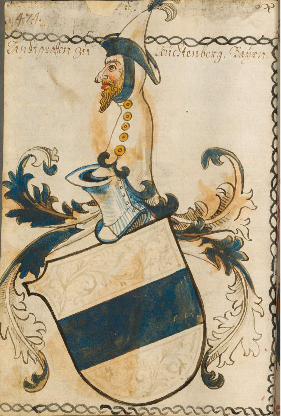 Scheibler'sches Wappenbuch , älterer Teil; Seite 474 Landtgraffen zu Leuchtenberg Bayern